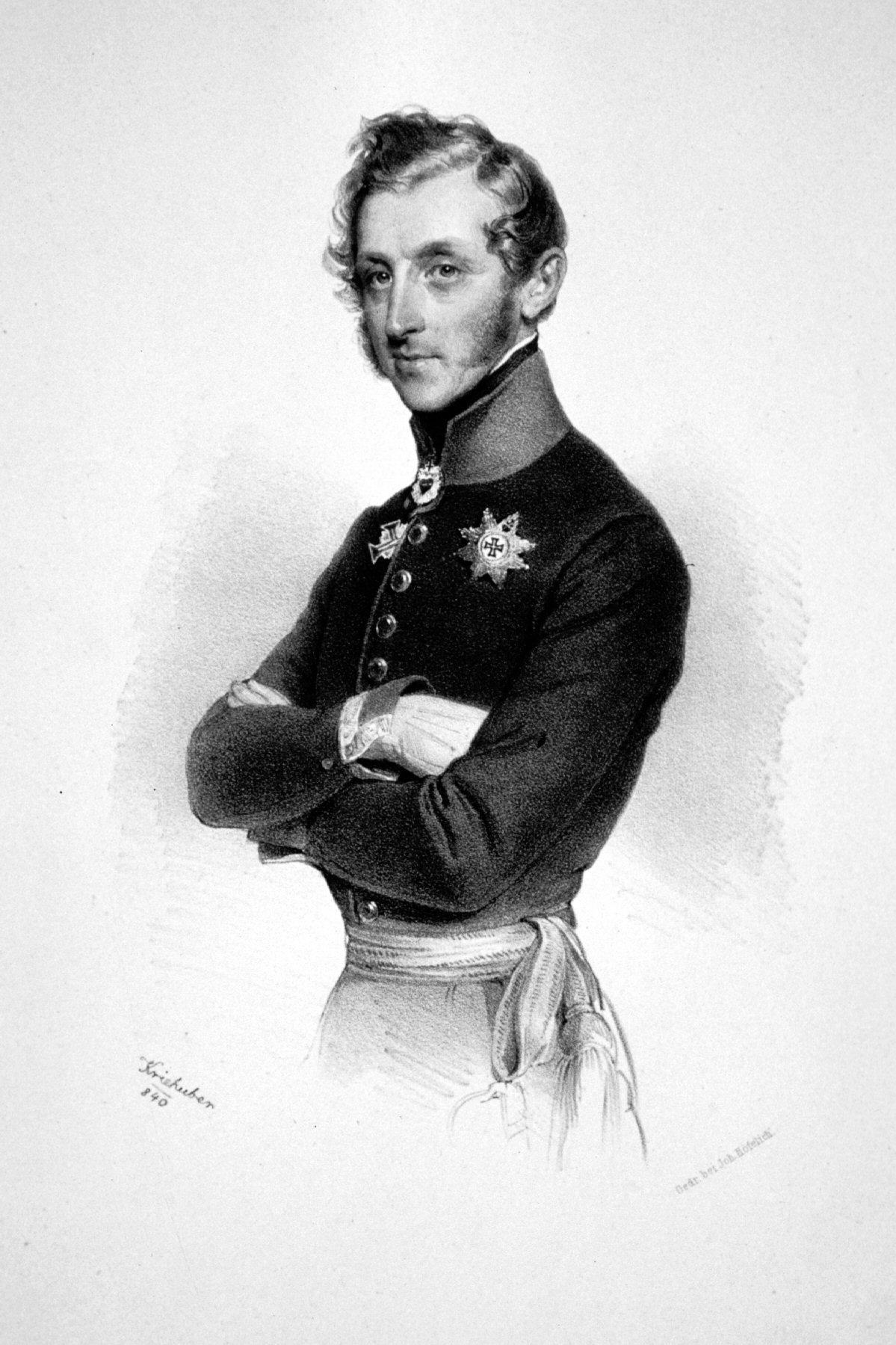 Friedrich Hannibal von Thurn-Taxis (1799-1857), Fürst, österreichischer General. Lithographie von Josef Kriehuber, 1840